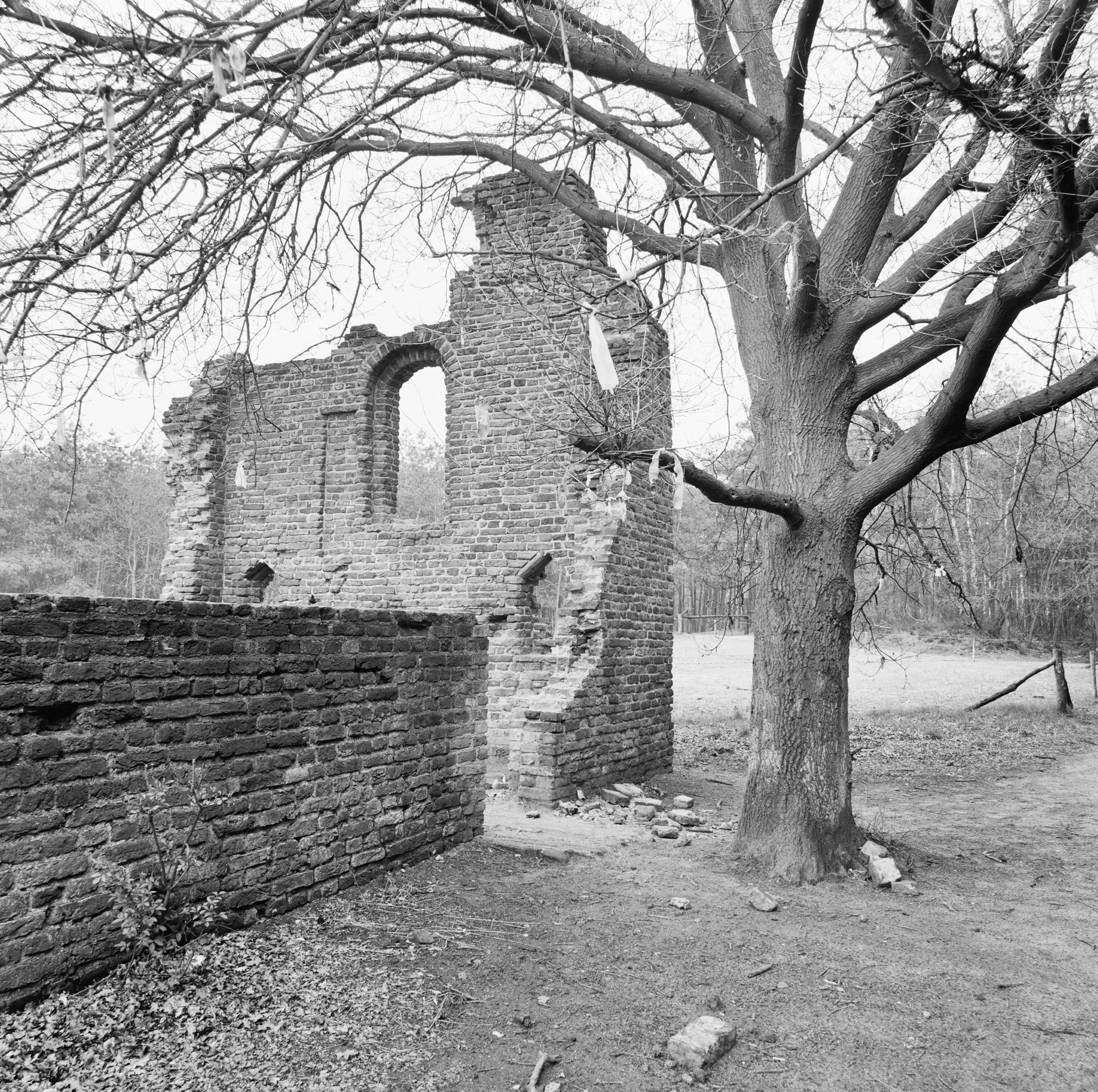 Sint Walrickkapel: oostzijde kapel